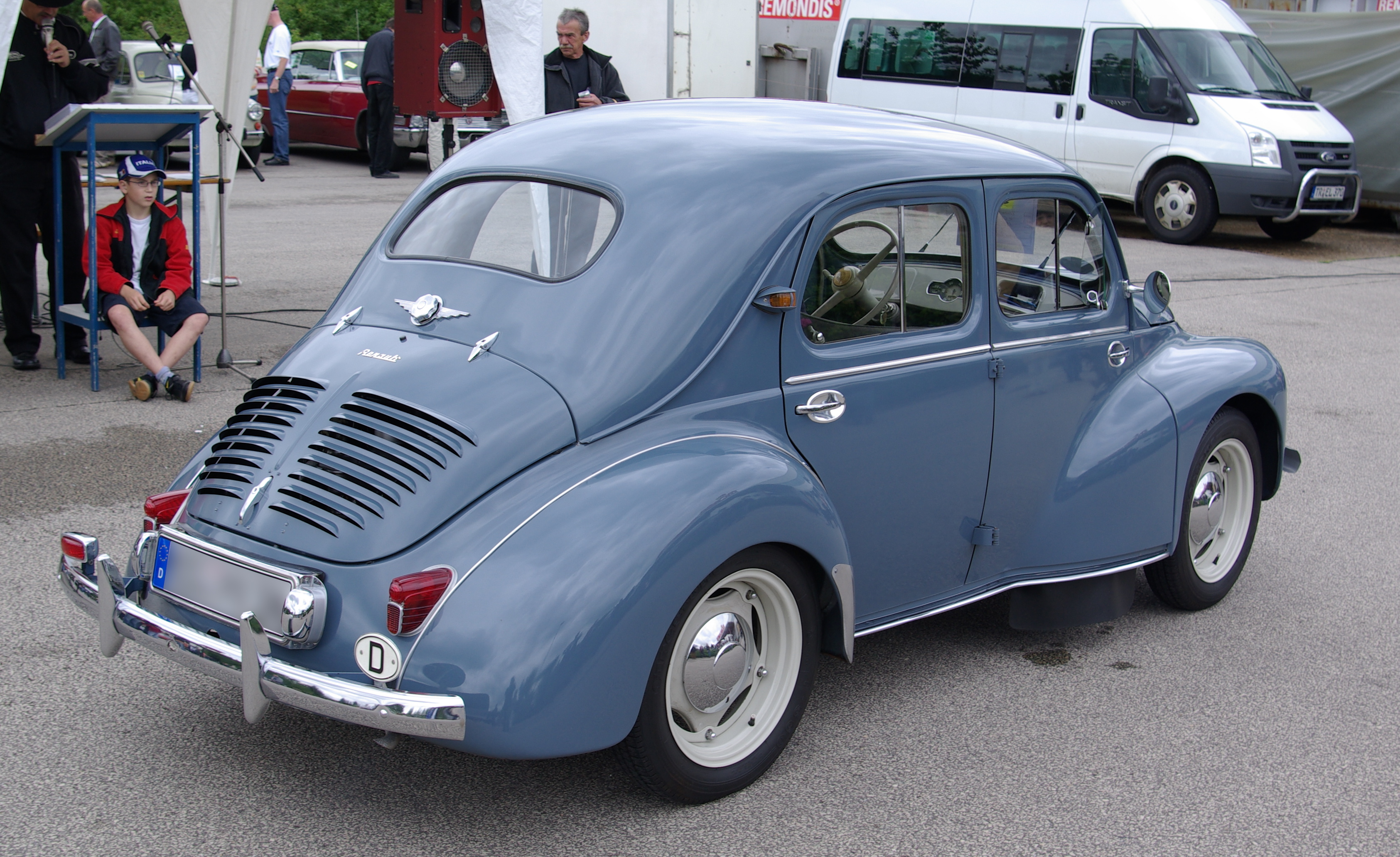 Renault 4CV, Baujahr 1955, Leistung 21 PS